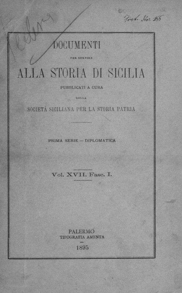 Frontespizio